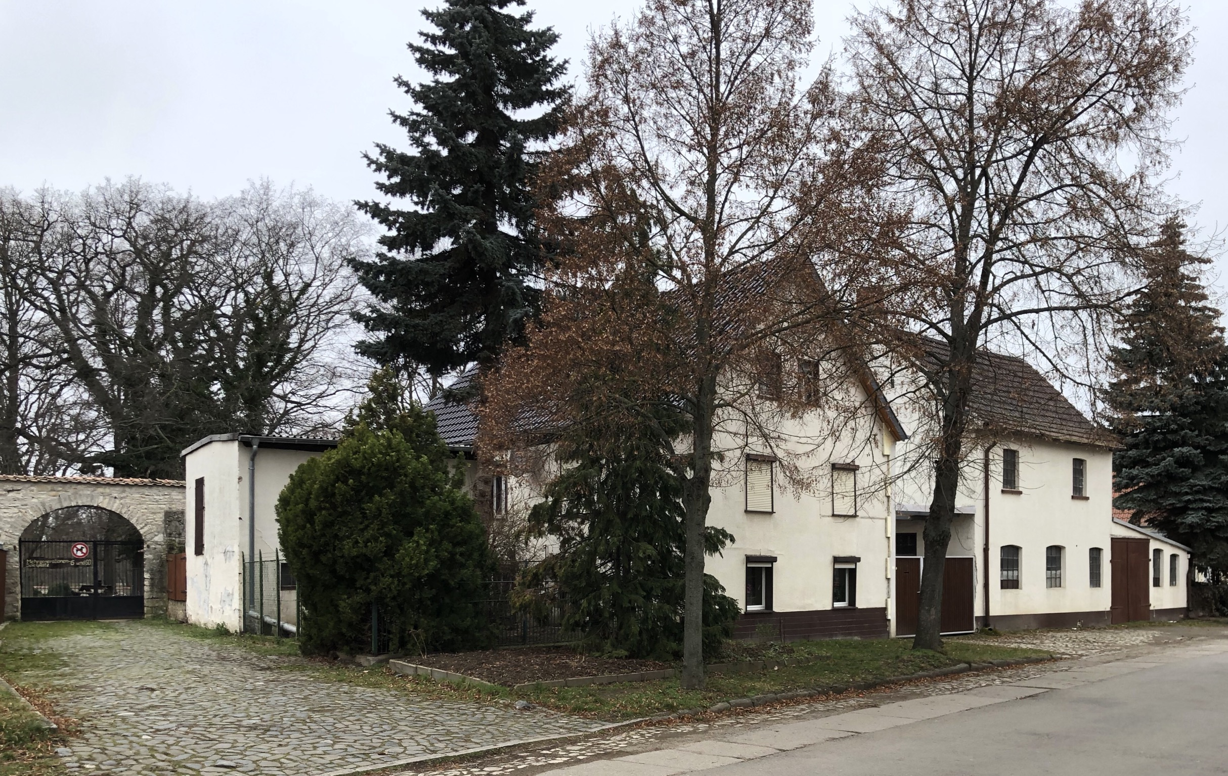 Klosteeschmiede Hedersleben